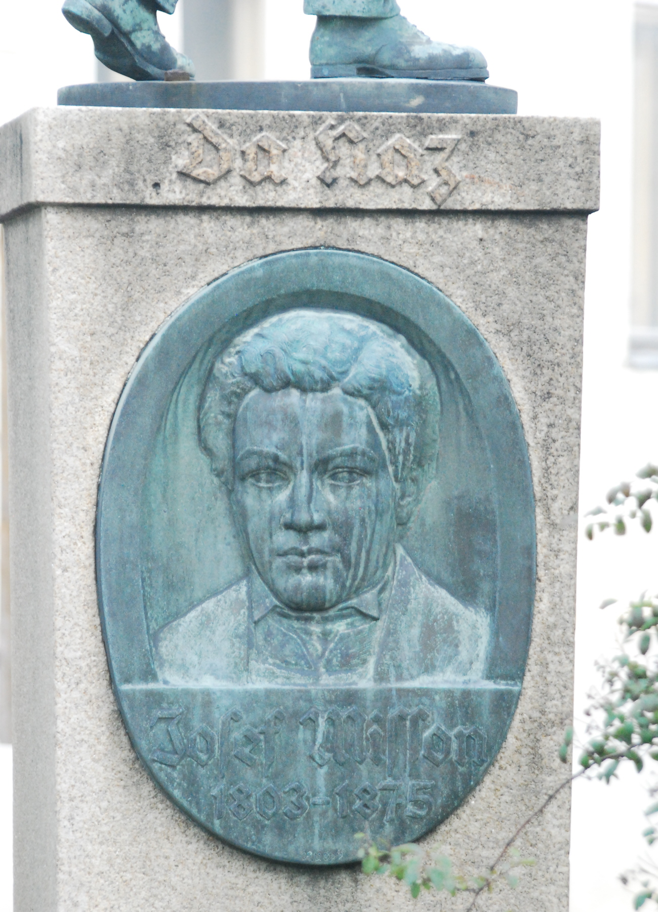 Portrait-Relief von Josef Misson auf seinem Denkmal in der Hamerlingstraße in Horn in Niederösterreich